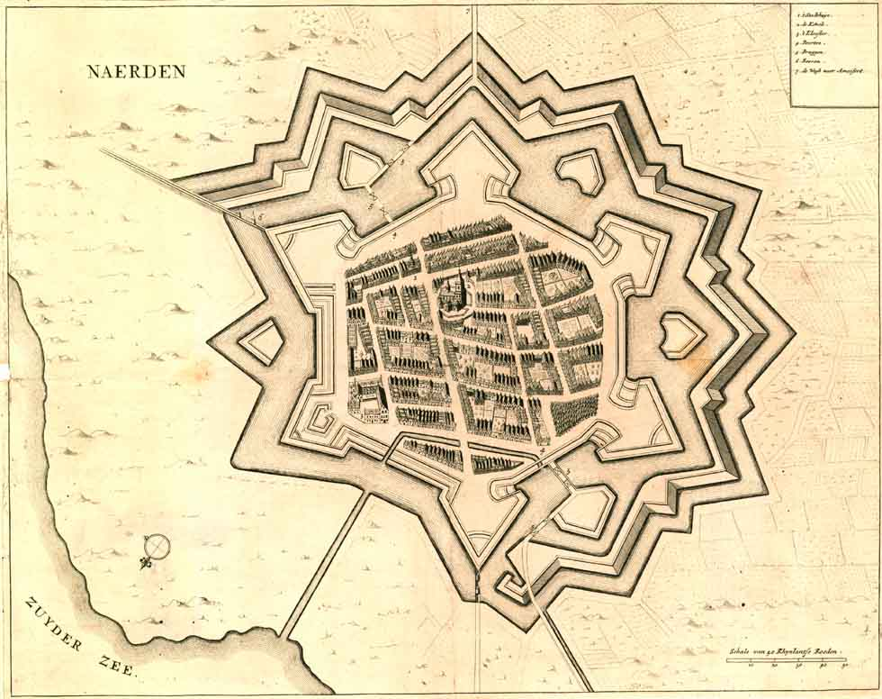 title=Naerden; size=double folio?